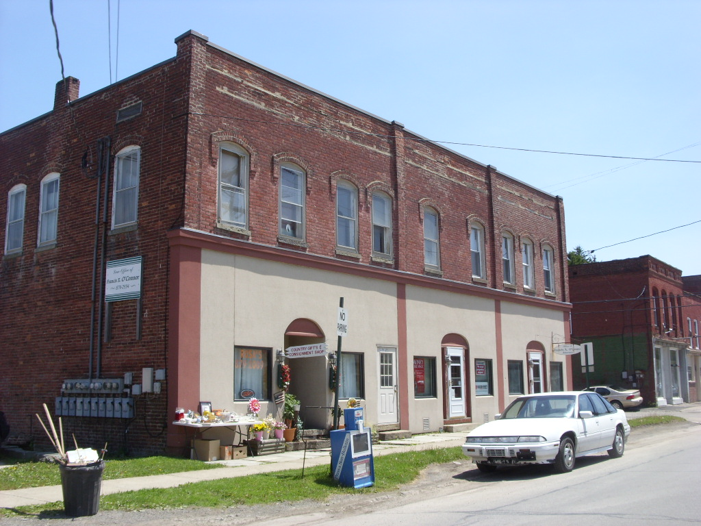 Great Bend, Pennsylvania